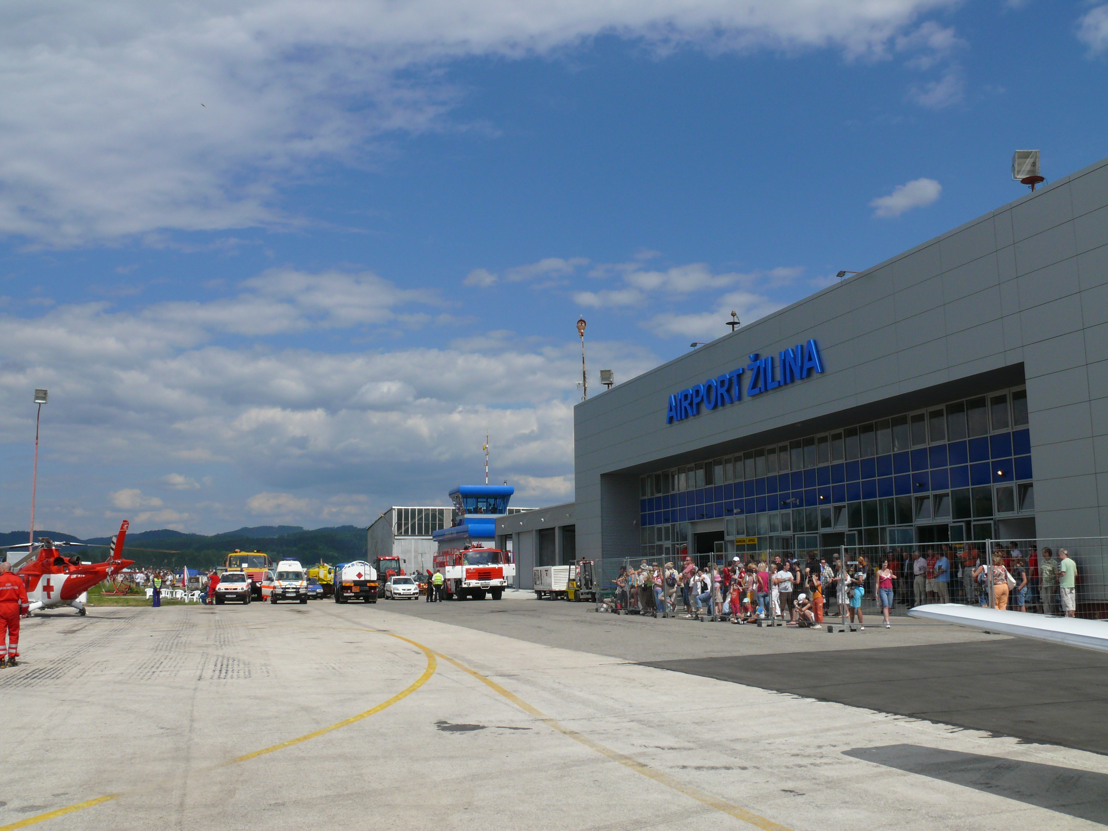 28.06.2008 - Medzinárodný letecký deň pri príležitosti 55. výročia založenia Žilinskej Univerzity a 90. výročia vzniku československého letectva.